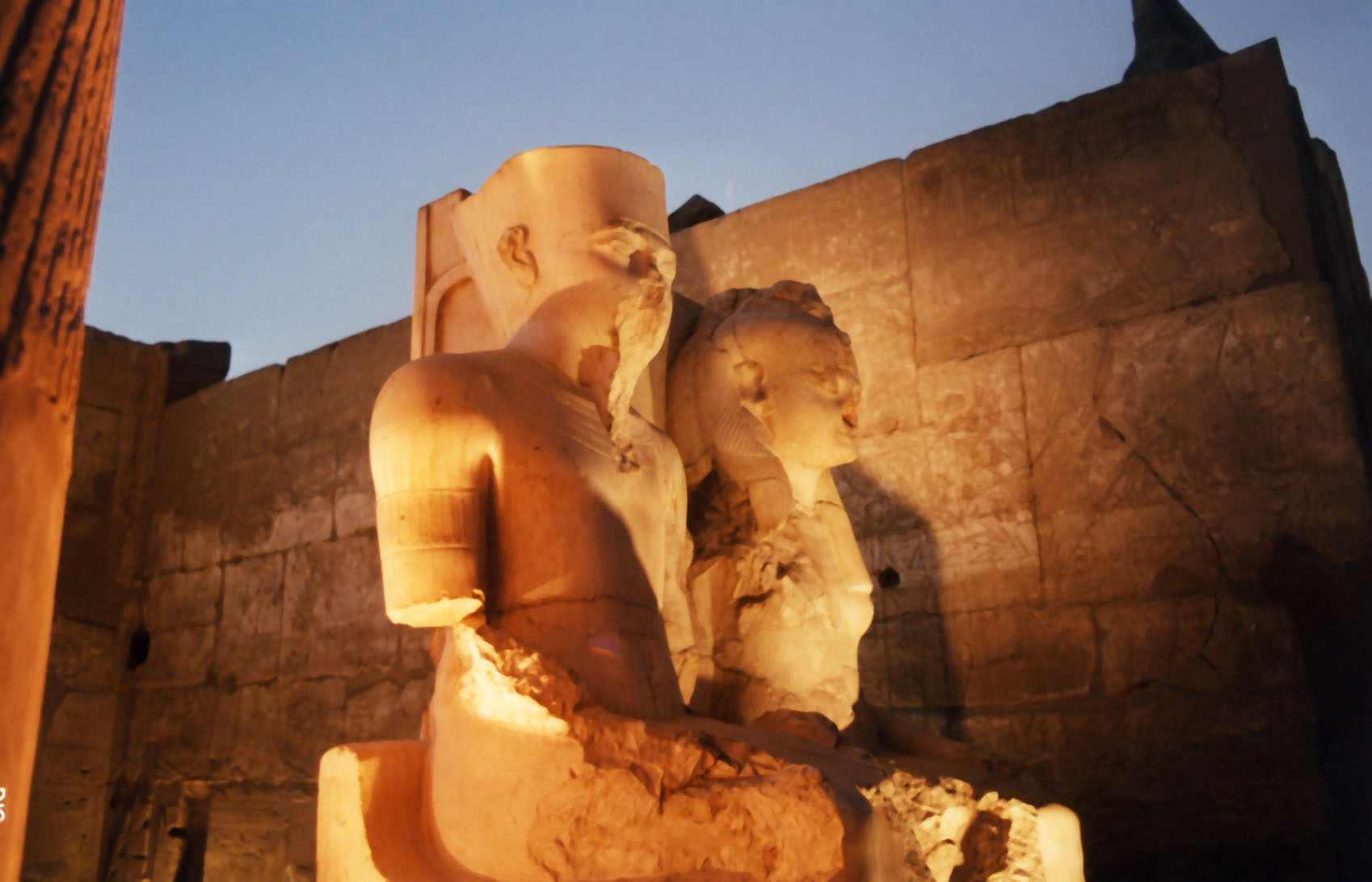 Autore: Hotepibre (Giuseppe); LocalitÃ e data: Luxor, dicembre 2000; Soggetto: Tutankhamon ed Ankhesenamon (statua "usurpata" da Ramses II)